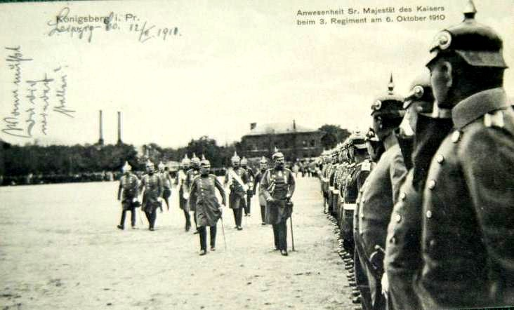 Kaiserbesuch am 6.10.1910 in Königsberg beim Grenadier-Regiment „König Friedrich Wilhelm I.“ (2. Ostpreußisches) Nr. 3